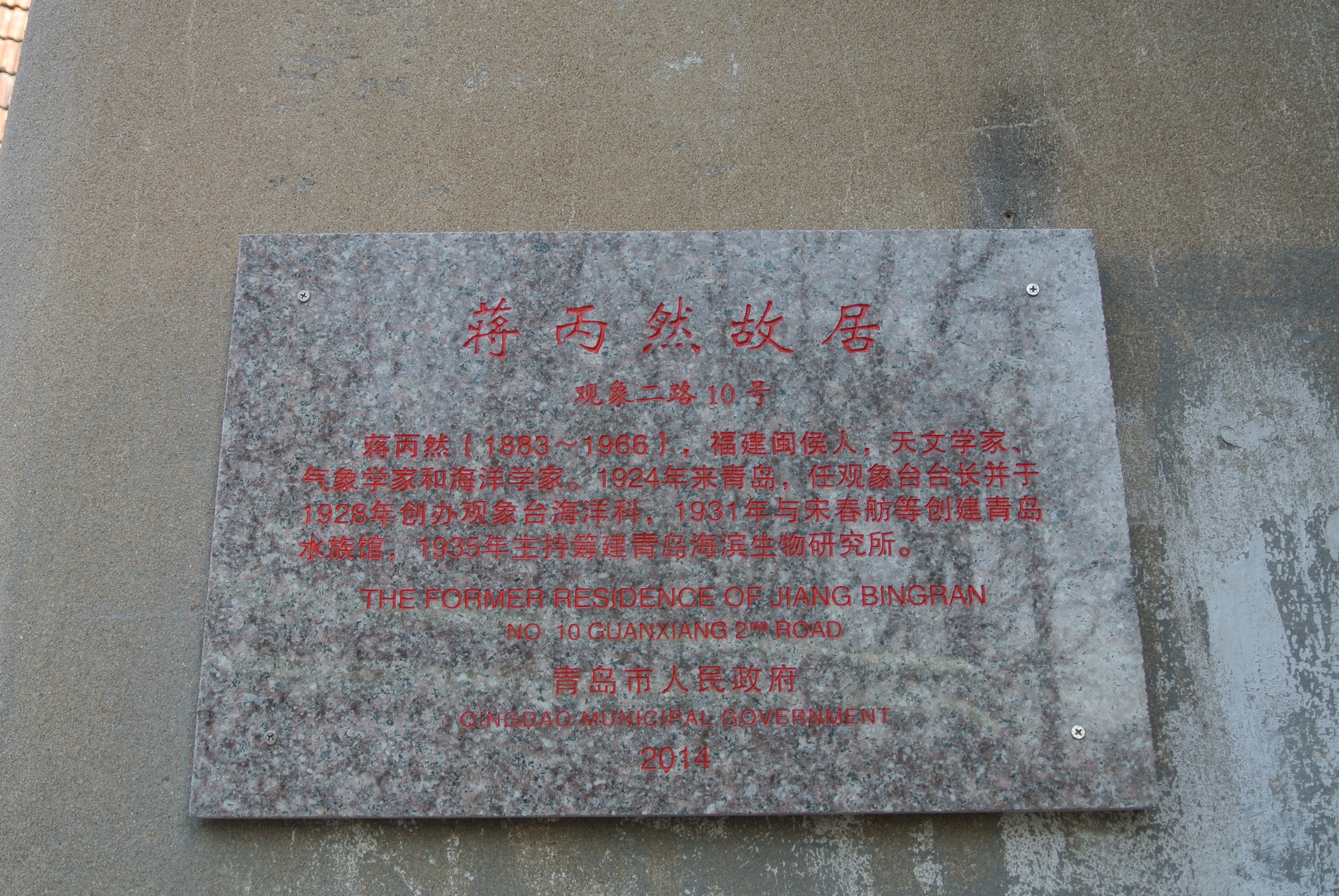 青岛蒋丙然故居标志牌